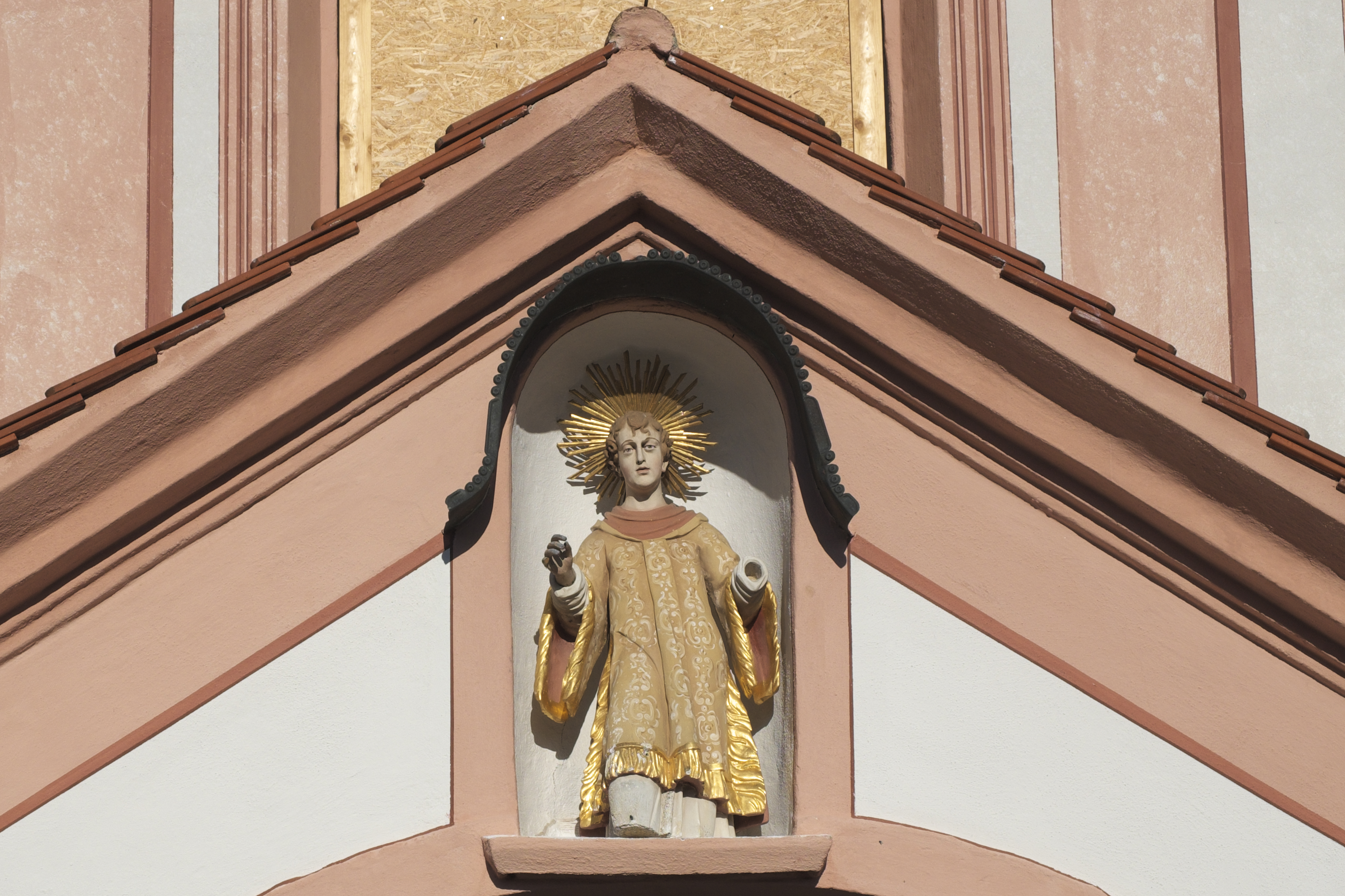 Katholische Filialkirche St. Laurentius in Pflugdorf (Vilgertshofen) im oberbayerischen Landkreis Landsberg am Lech (Bayern/Deutschland)